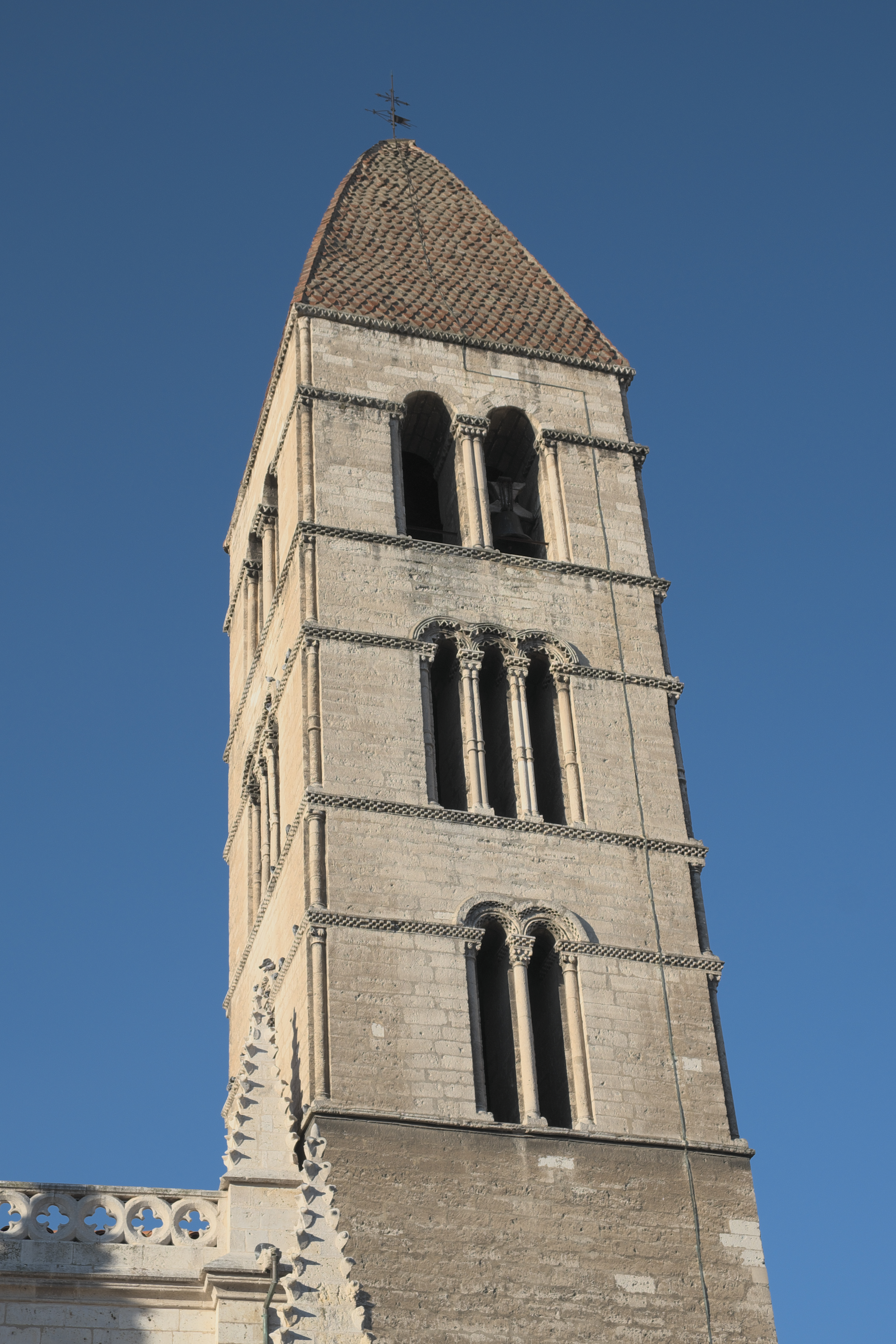 Katholische Kirche Santa María La Antigua in Valladolid (Kastilien und León/Spanien)